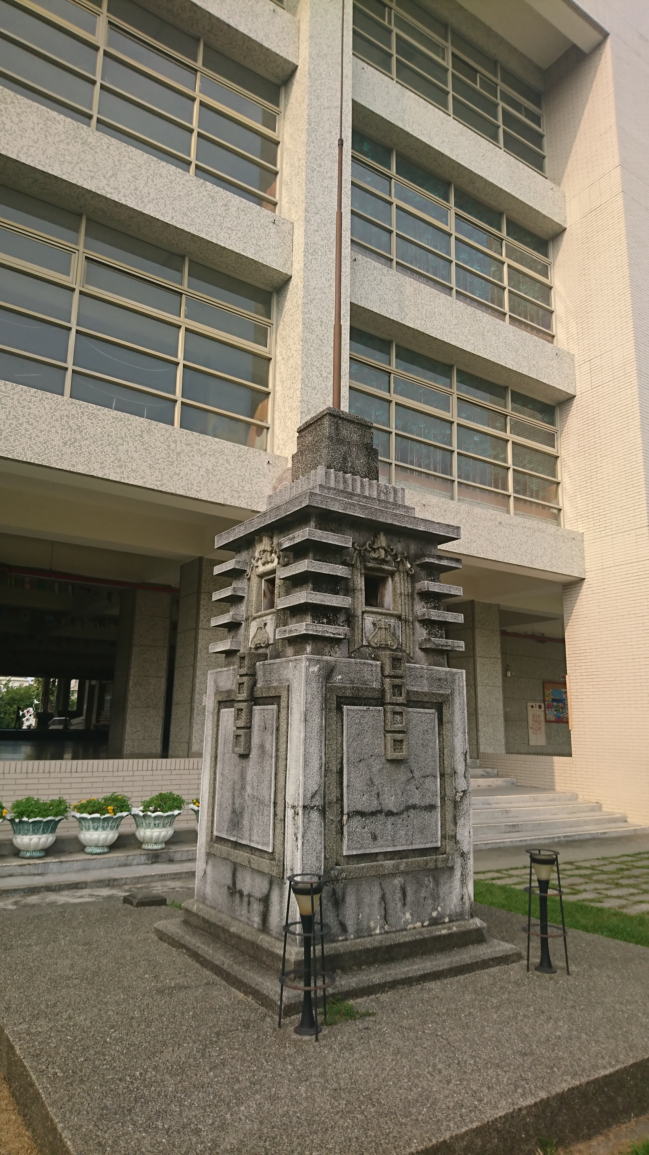 臺灣嘉義市崇文國小百年播音台，日治時期建造的播音塔，為全台僅存的一座校內播音塔，實際建造年份不詳，推測應在1935年至1939年間所建，主要用途為播放運動會進行曲、校歌、國歌等